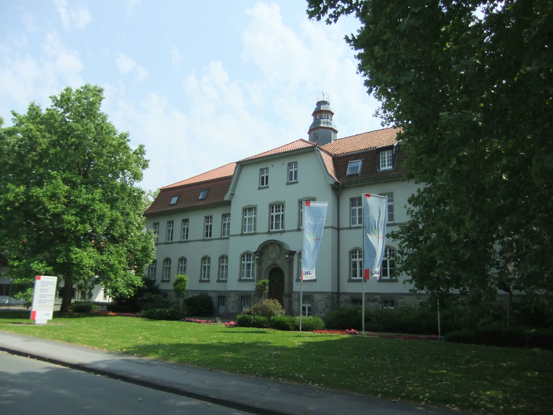 LWL-Zentrum für Forensische Psychiatrie Lippstadt im Juni 2014. Haupteingang im Stadtteil Eickelborn.